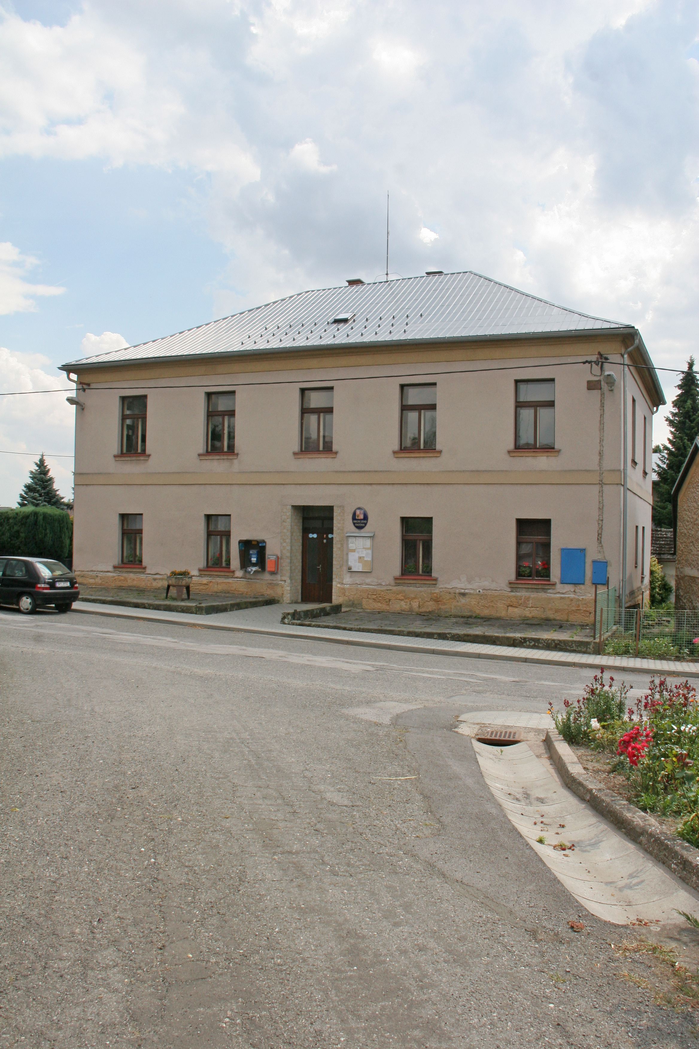 Trotina obecní úřad